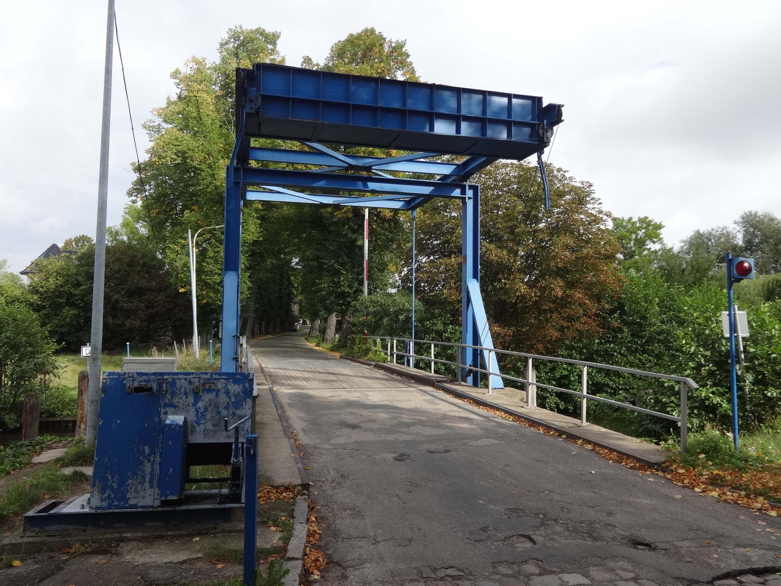 Historische Zugbrücke in Groß Köris